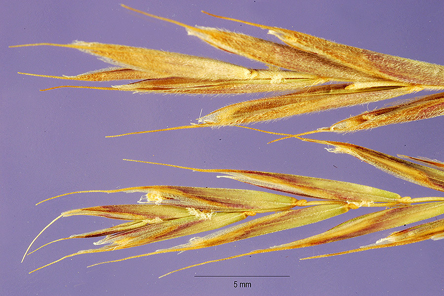 Festuca brevipila Tracey hard fescue